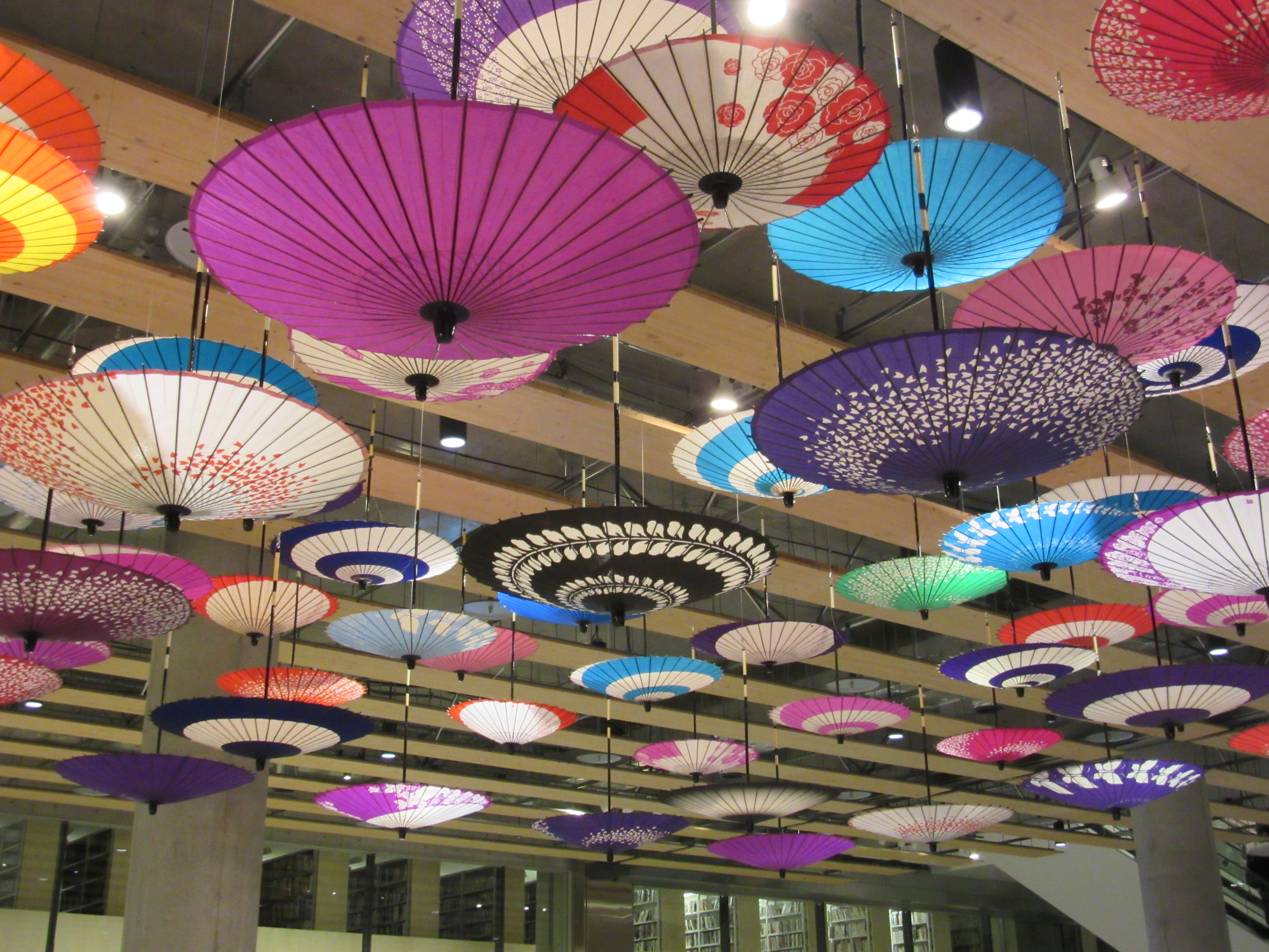 岐阜県岐阜市のみんなの森 ぎふメディアコスモス1階天井に展示されている岐阜和傘